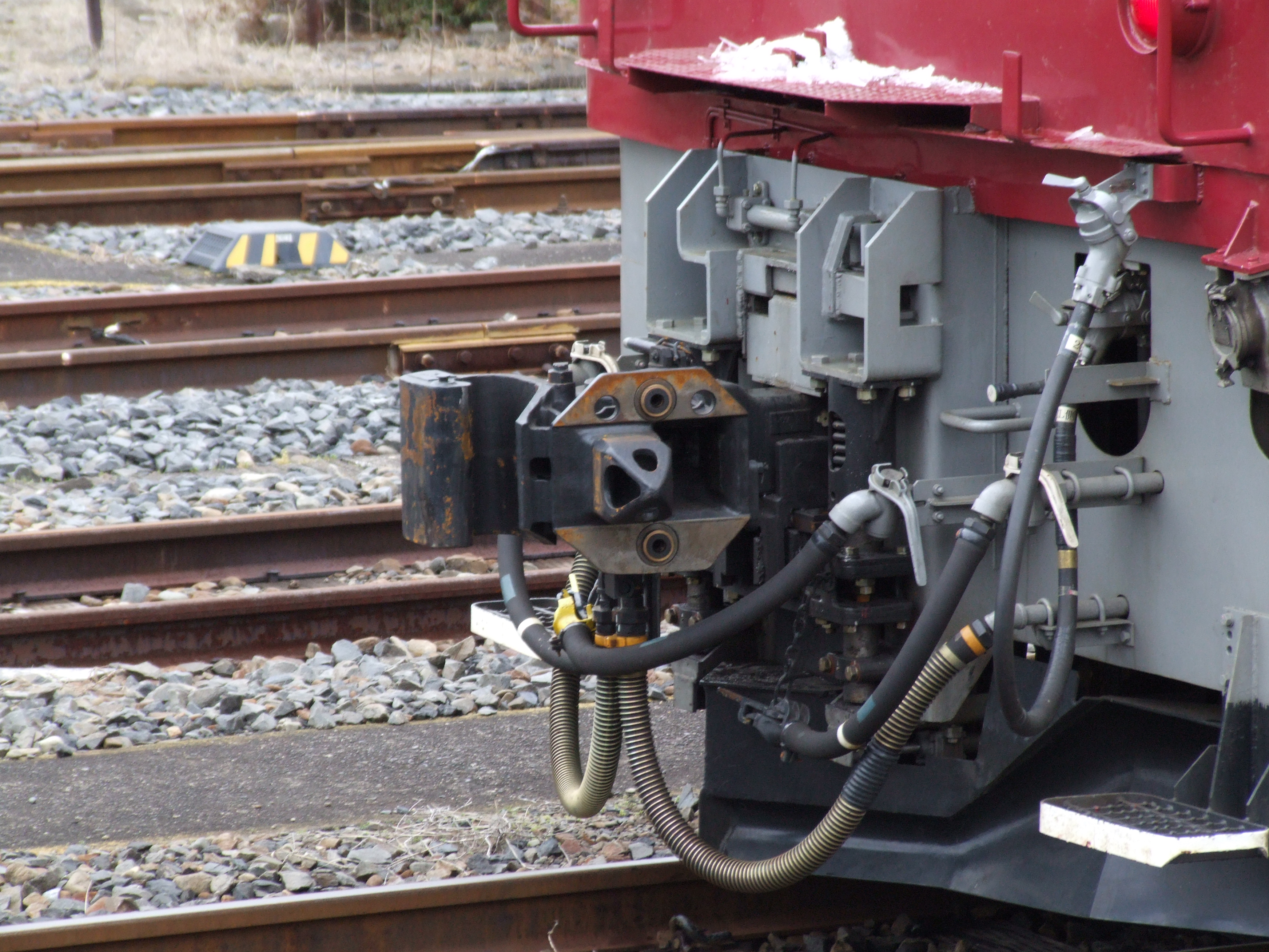 EF81 141の双頭連結器（尾久駅ホームから撮影）